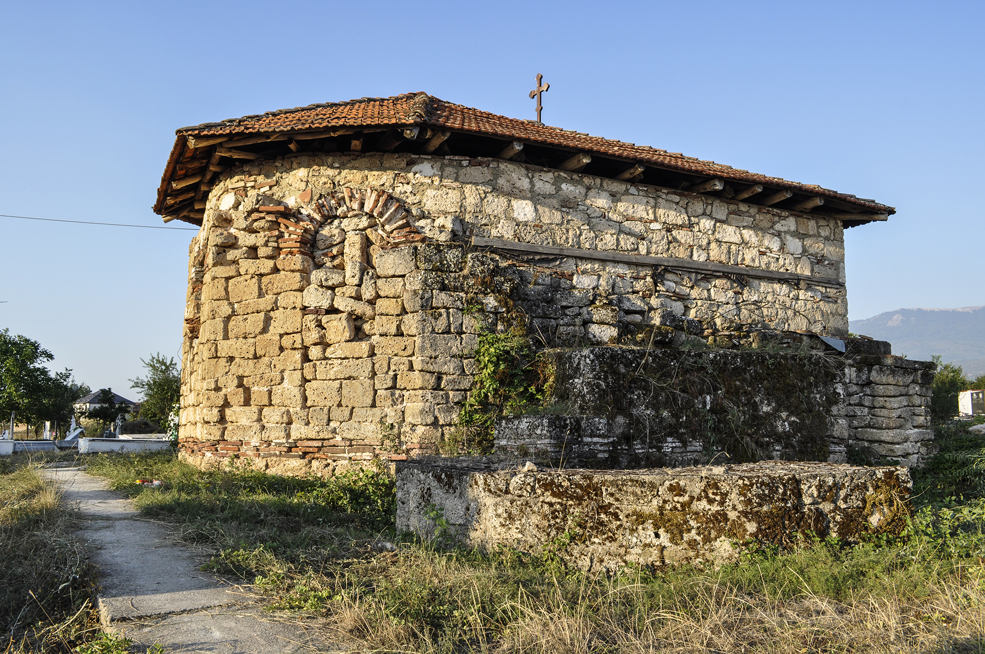 Црква „Воведение на Пресвета Богородица“ - Враништа